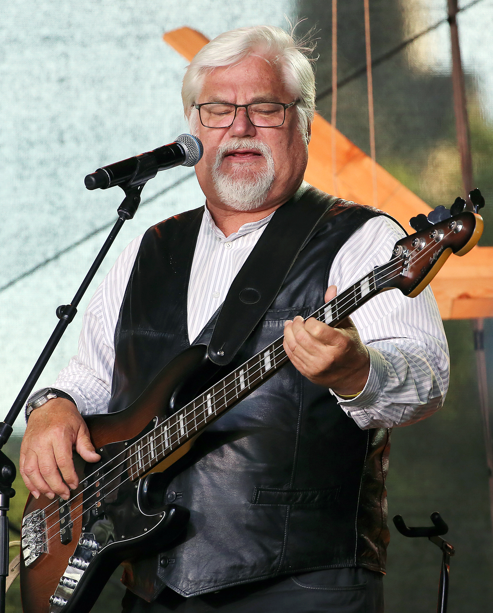 Ike Volkov, Kukerpillid 2017.